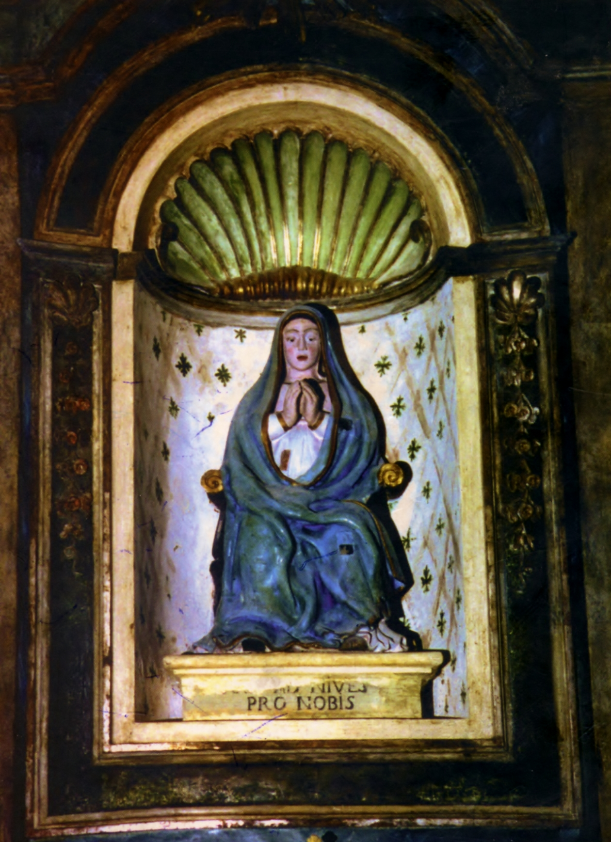 Statua della Madonna Della Neve in terracotta nella Chiesa Parrocchiale del Ss. Salvatore di Pagliara dei Marsi.